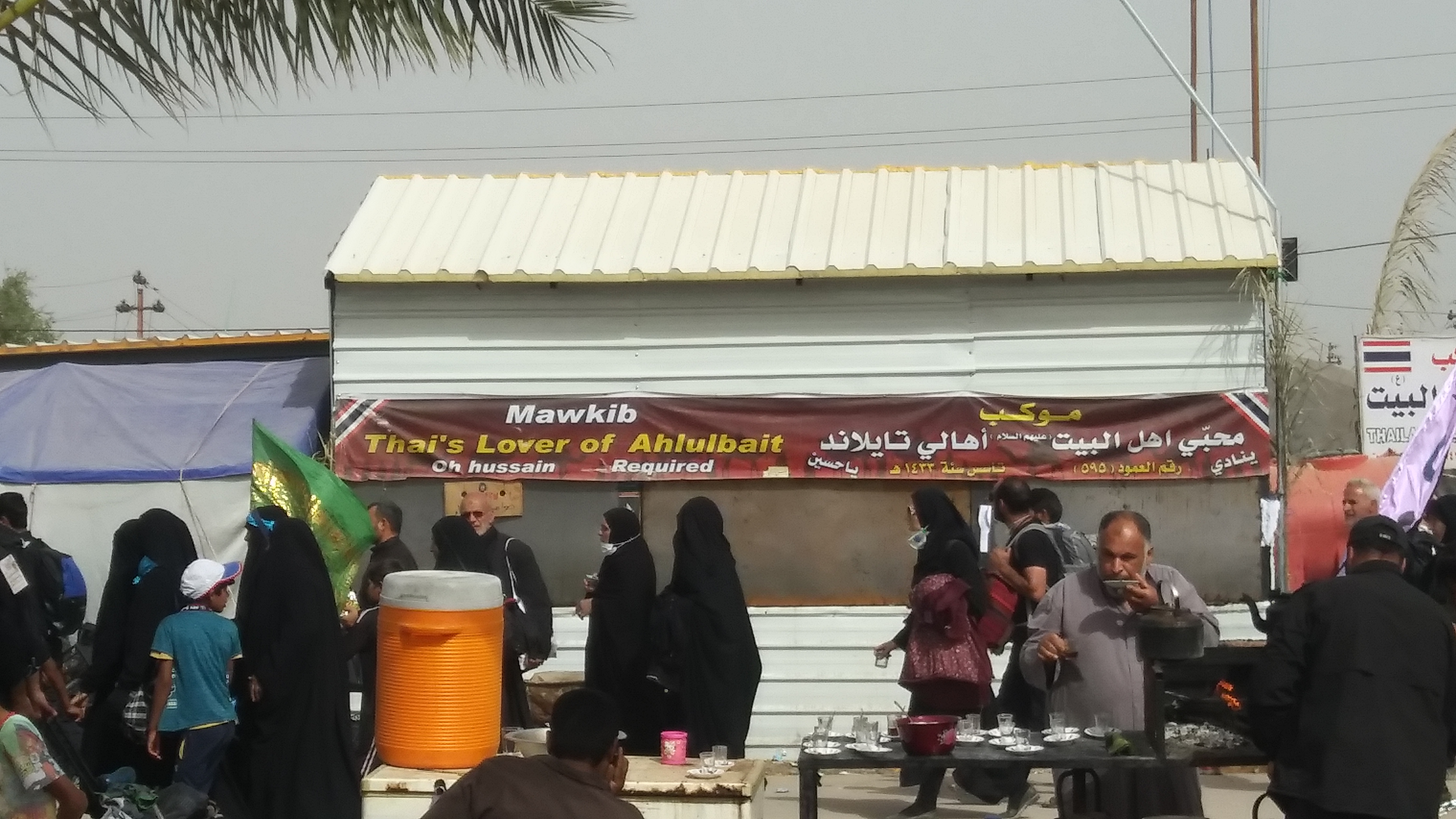 موکب شیعیان تایلندی در مسیر نجف کربلا